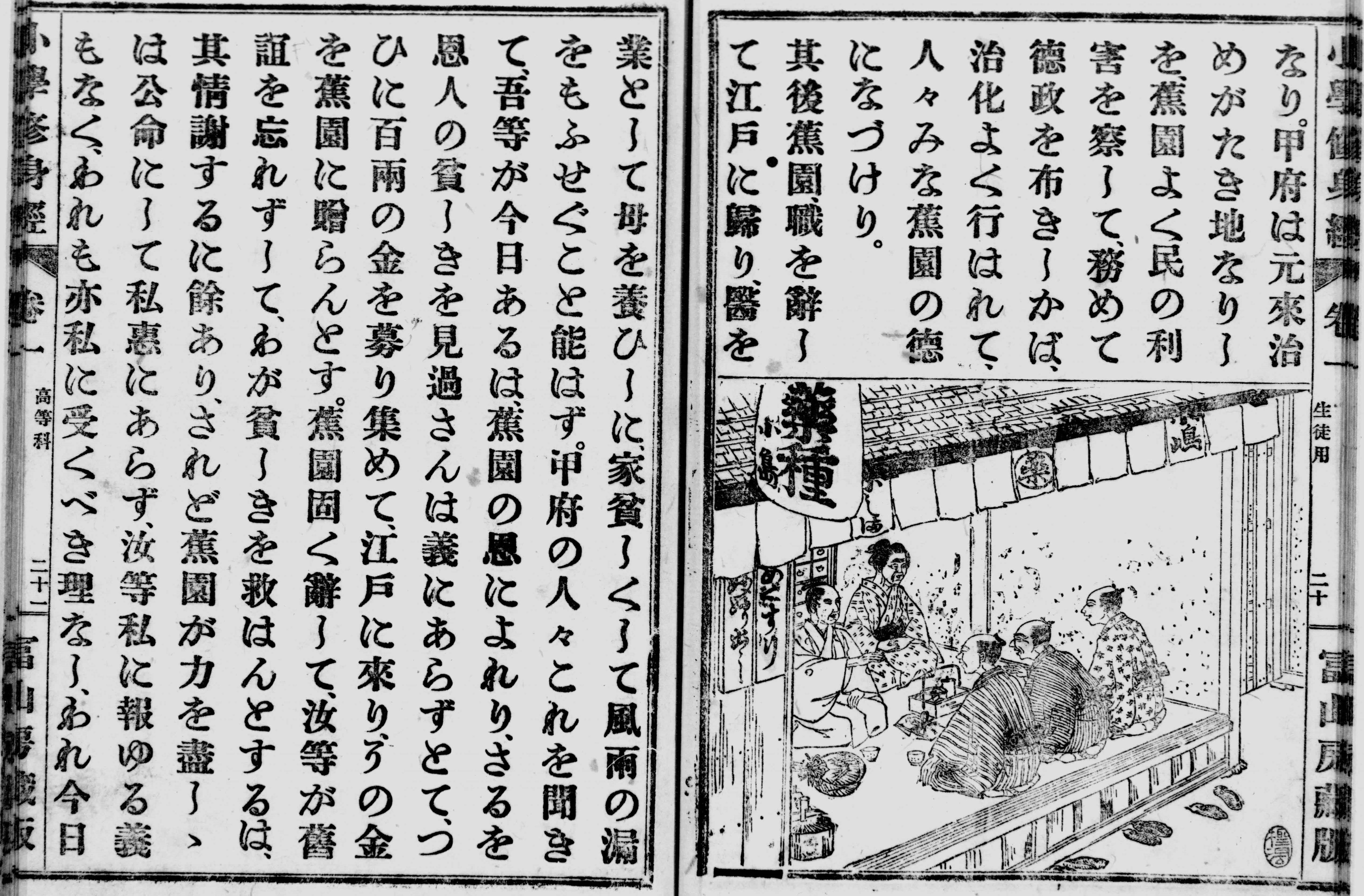 『小学修身経 高等科生徒用』巻1第20課「小島蕉園の廉潔」